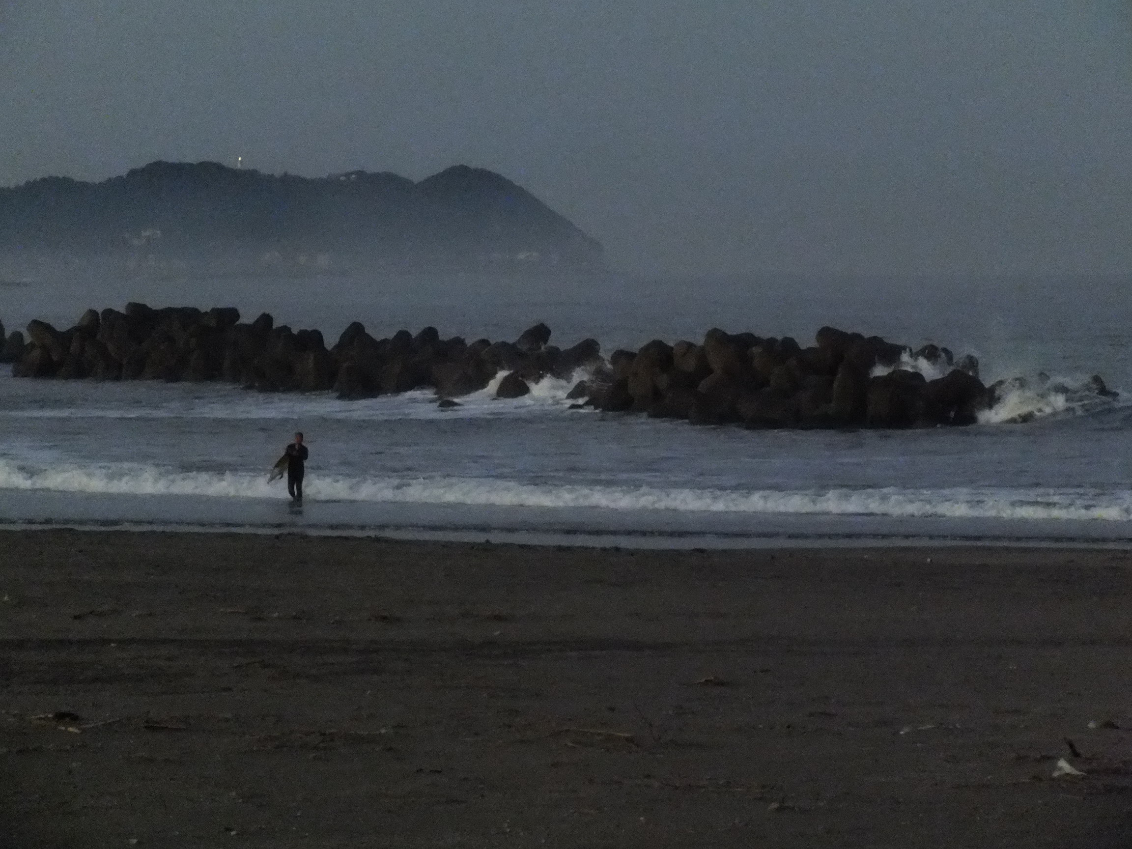 2013-11-30 Hachiman-Misaki Ohhara Isumi いすみ市大原海水浴場